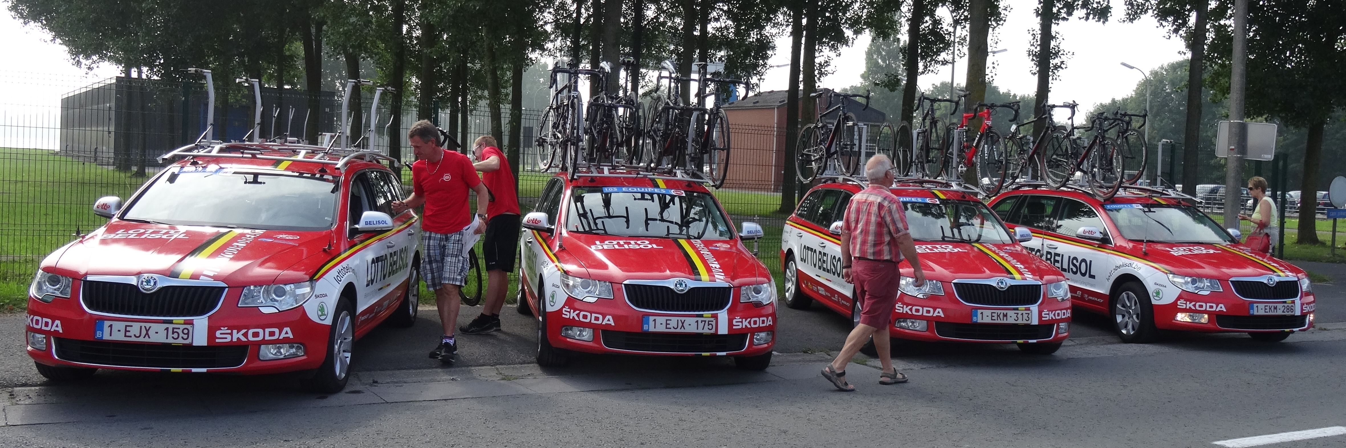 Reportage photographique réalisé le dimanche 27 juillet à l'occasion du départ de la deuxième étape du Tour de Wallonie 2014 à Péronnes-lez-Antoing (Antoing), Belgique.